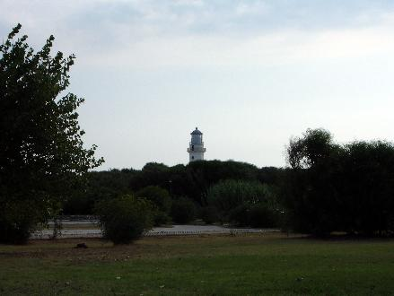 Capo Colonna, KR, Italia Alberto Panu